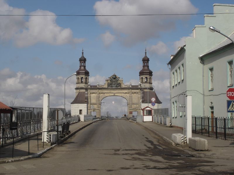 Sovetsk (before 1945: Tilsit), Kaliningrad Oblast, Russia.Bridge in Tilsit - April 06